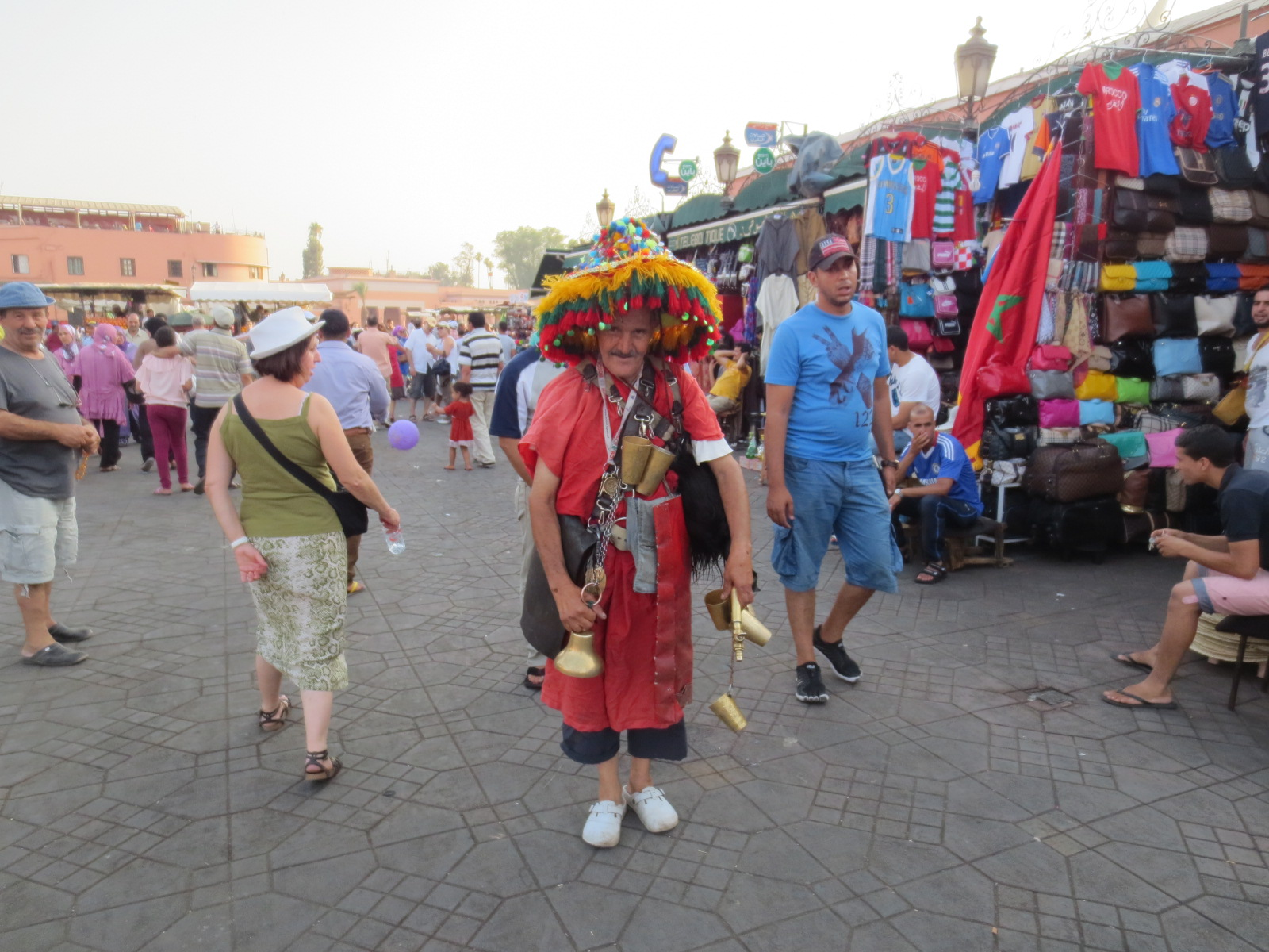 Souqs of Marrakech